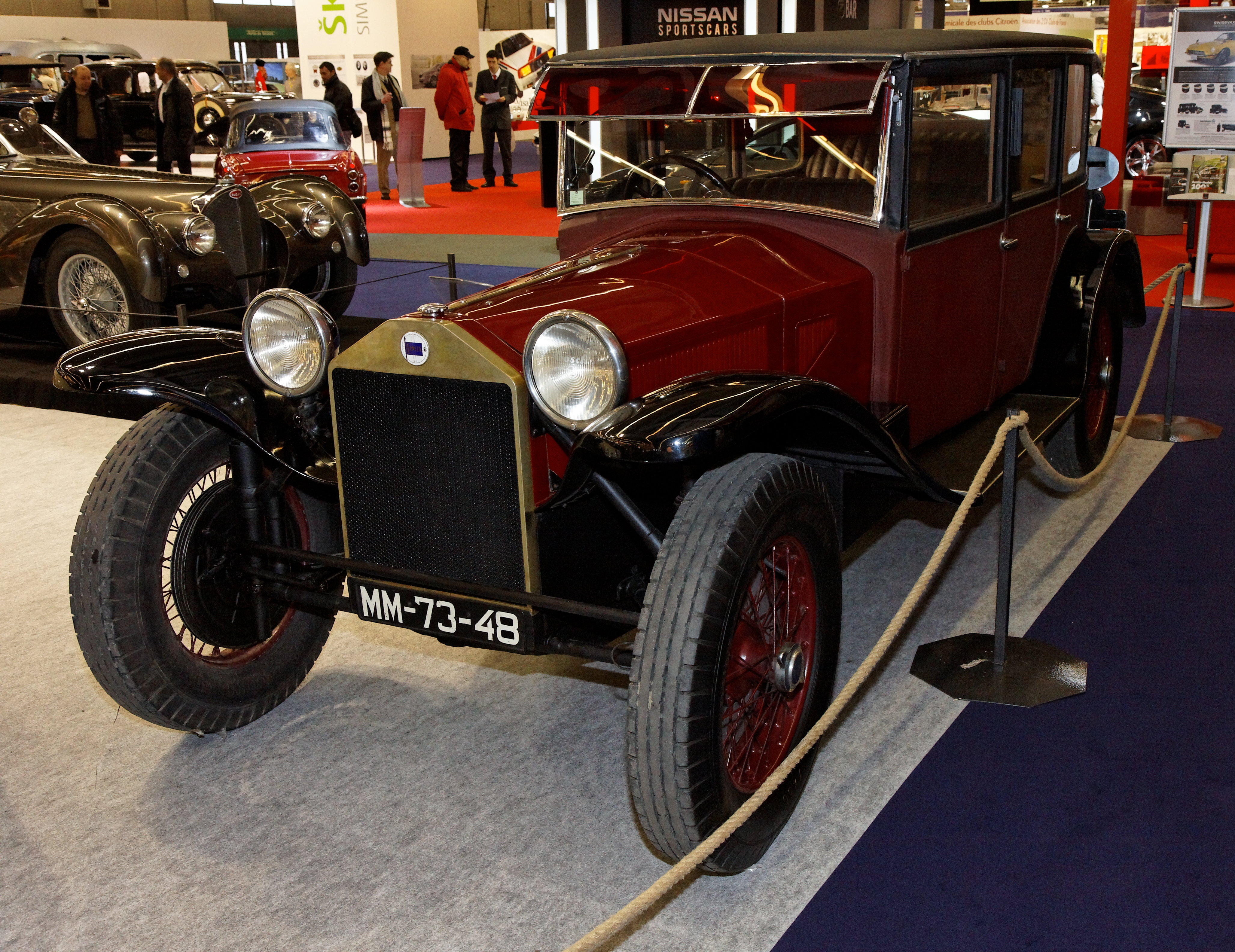 Photographie prise lors du salon rétromobile 2011 à Paris, porte de Versailles.